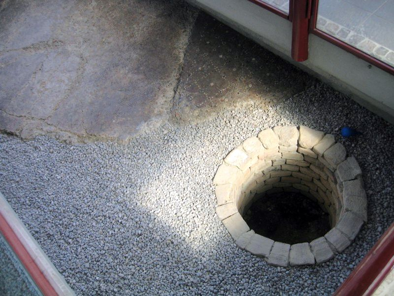 Oderzo (Provincia di Treviso, Veneto, Italia). Pozzo romano presso il percorso archeologico di Via dei Mosaici. Oderzo, (Treviso, Veneto, Italy). Ancient roman well in Mosaici Street.